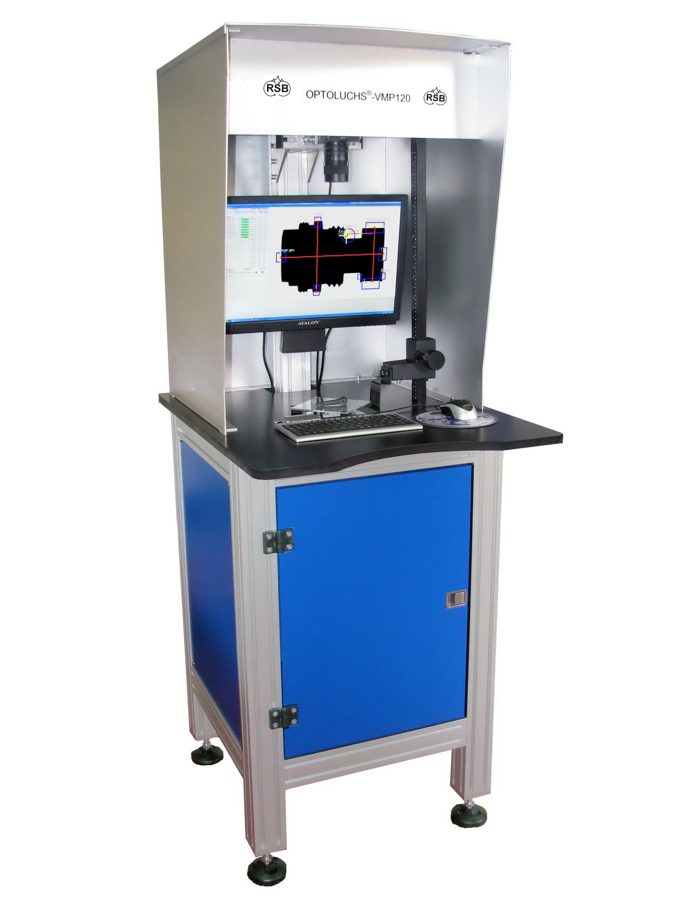 Videomessprojektor Optoluchs-VMP 120 zur Drehteilvermessung von RSB Optotechnik